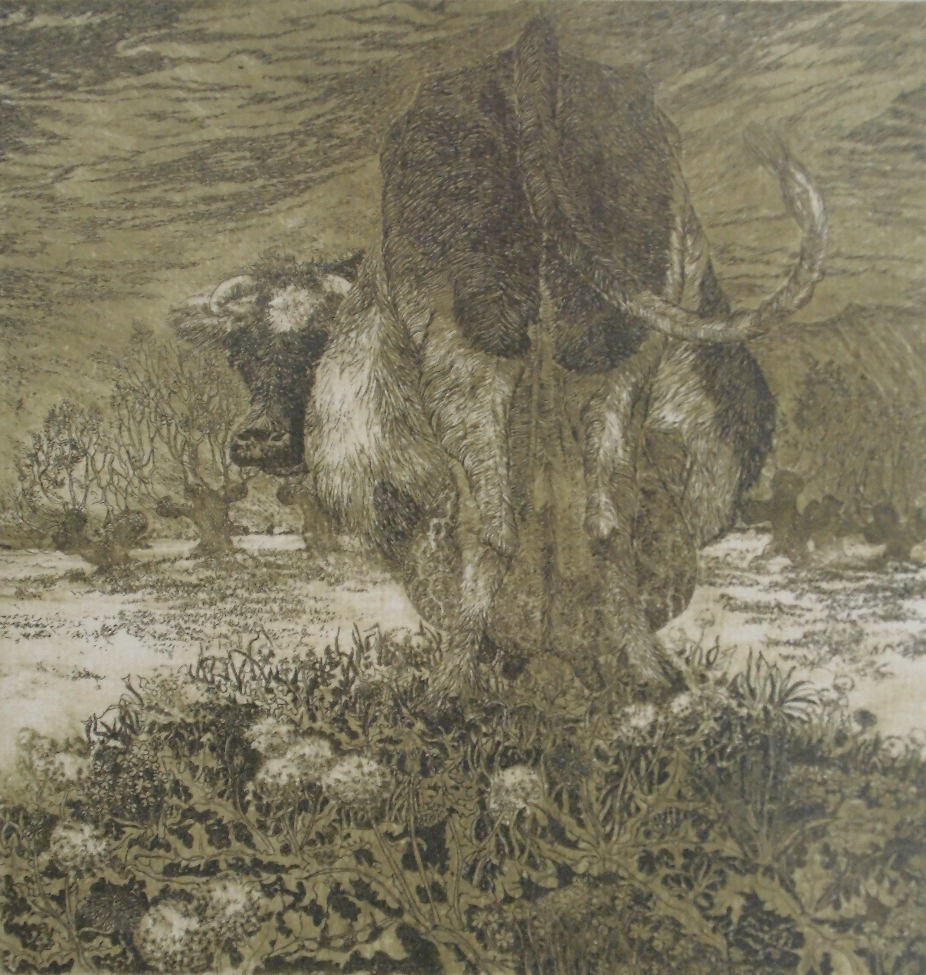 Radierung „Traum einer Intensivkuh“